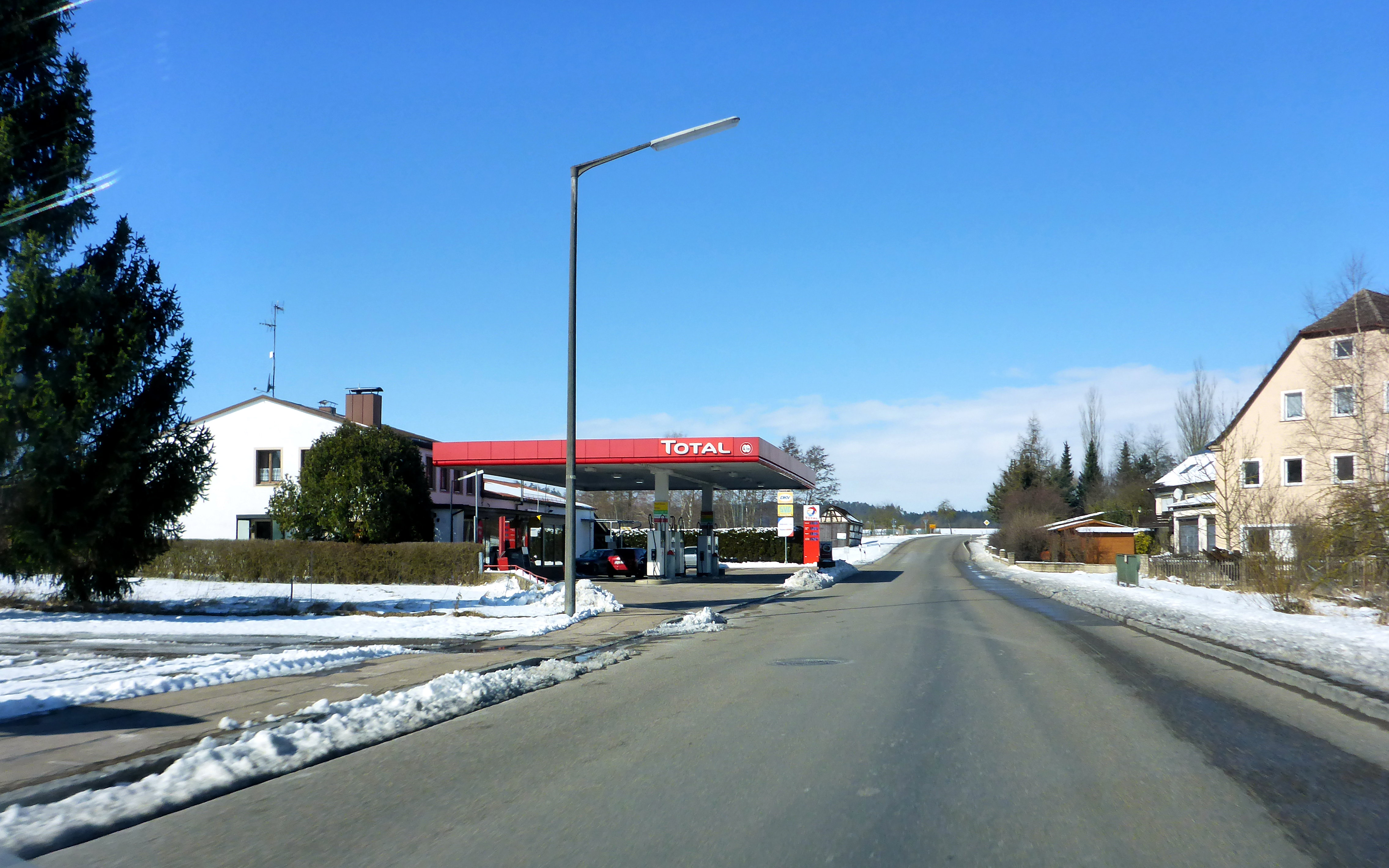 Dorgütingen B25 Tankstelle: "Total"